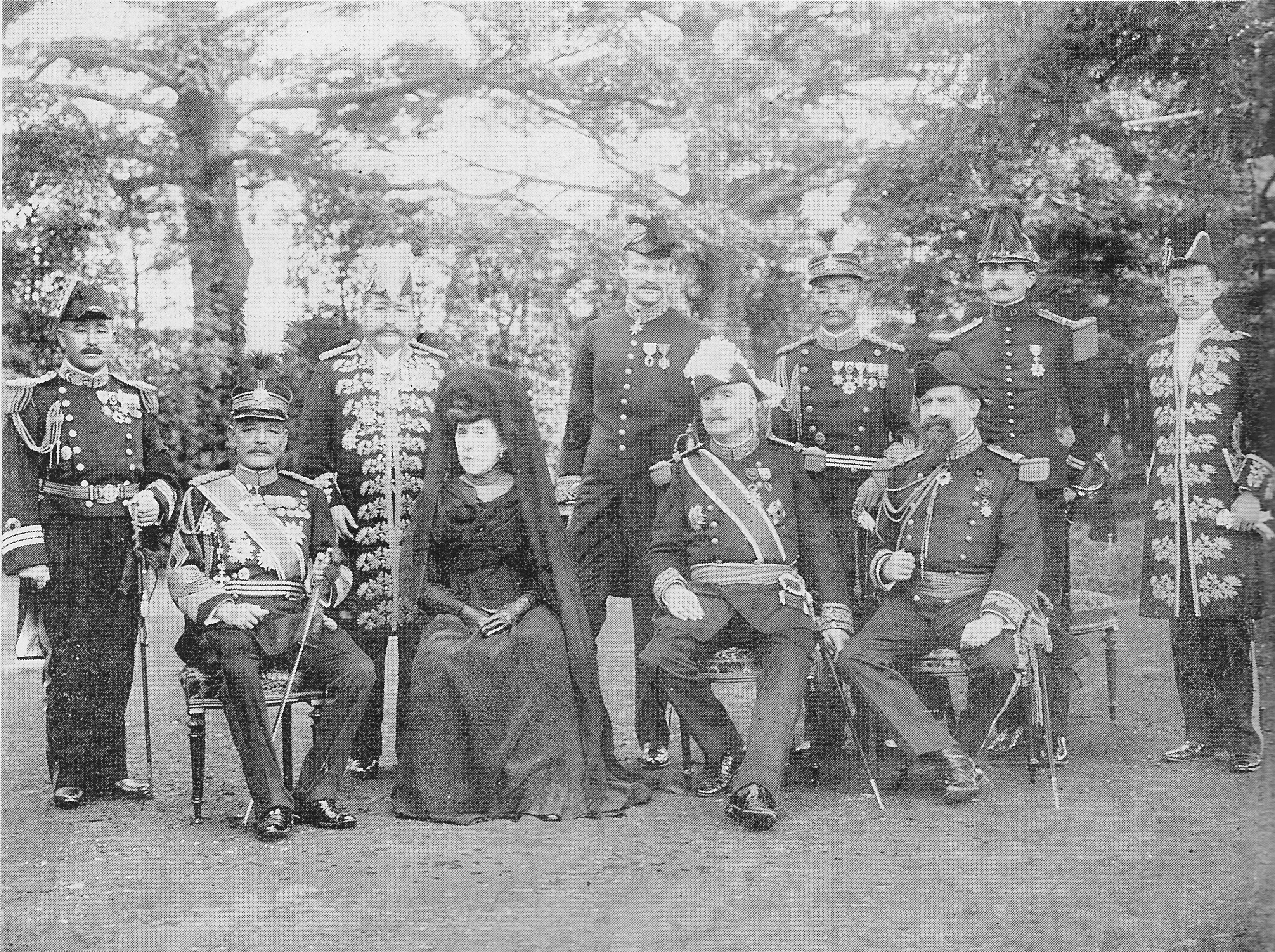 明治天皇の大喪儀におけるフランス特派使節。代表のジョルジュ・ルボン中将（前列右より2番目）、接伴員の秋山好古（前列左端）